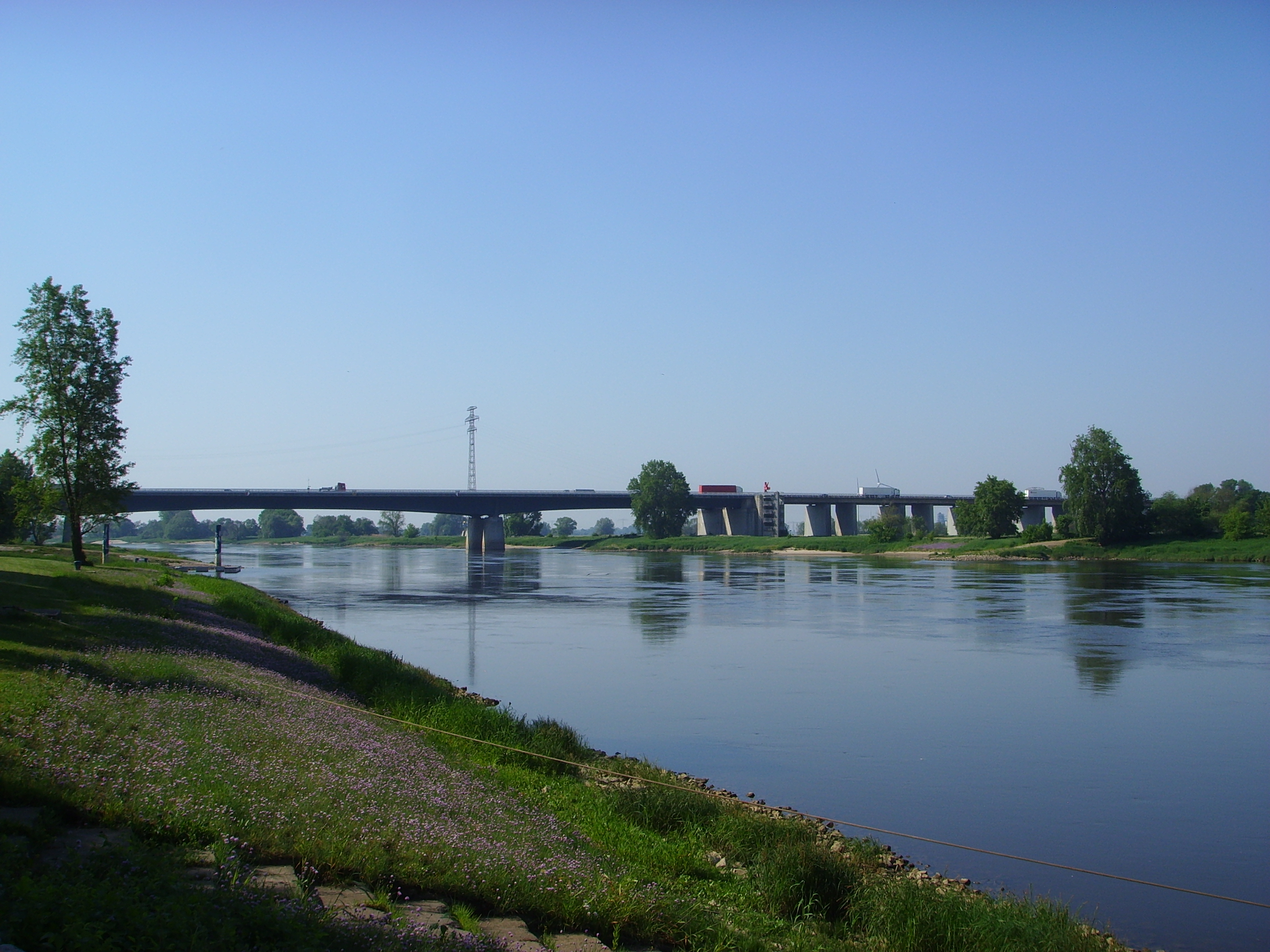 Elbebrücke Hohenwarte